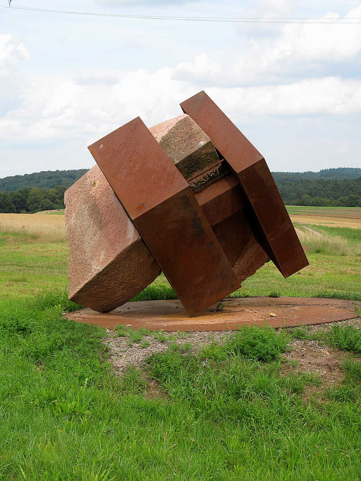 Martin Schöneich, Verbinden, 2000, - Deutschland, Rheinland-Pfalz, Skulpturenweg Schweinstal